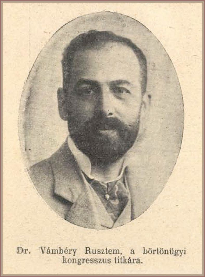 Vámbéry Rusztem, teljes nevén: Vámbéry Rustem Loránd Vilfried (Budapest, 1872. február 29. – New York, 1948. október 24.) jogász, polgári radikális publicista, Vámbéry Ármin orientalista fia. Az 1905. szeptember 10-én Budapesten tartott börtönógyi kongresszus titkáraként.